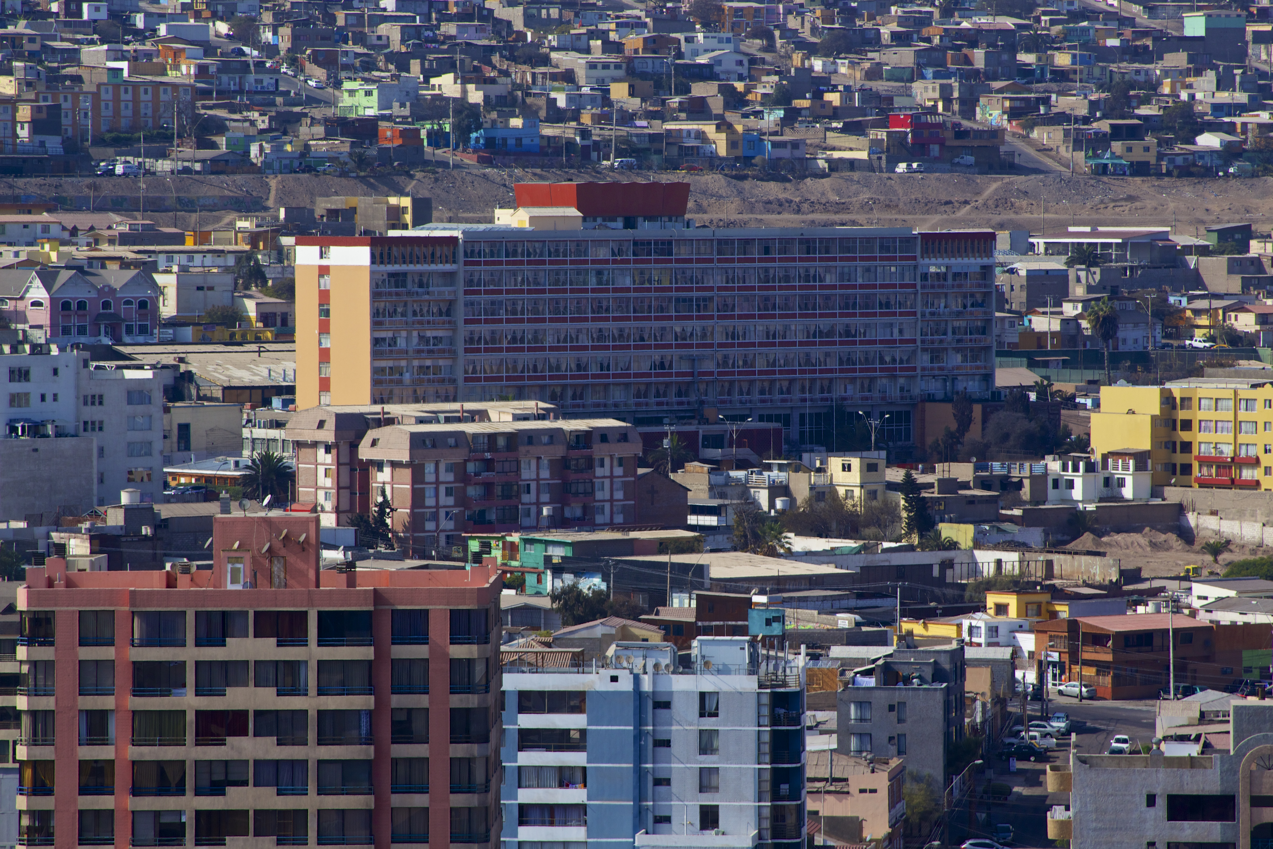 Panorámica de la fachada del Hospital Regional Dr. Leonardo Guzmán de Antofagasta, Chile.